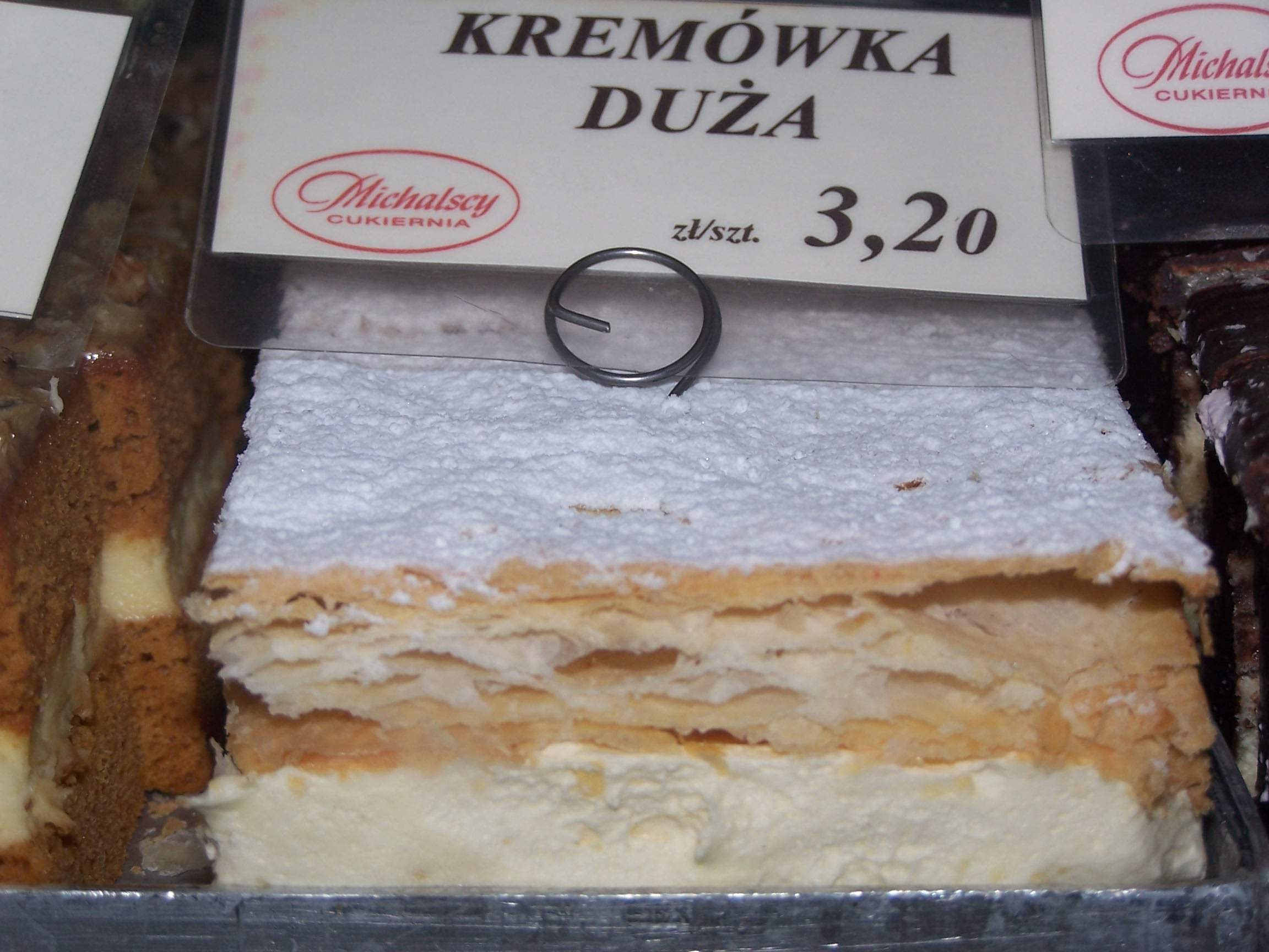 Photo by Piotrus. Kremówka.